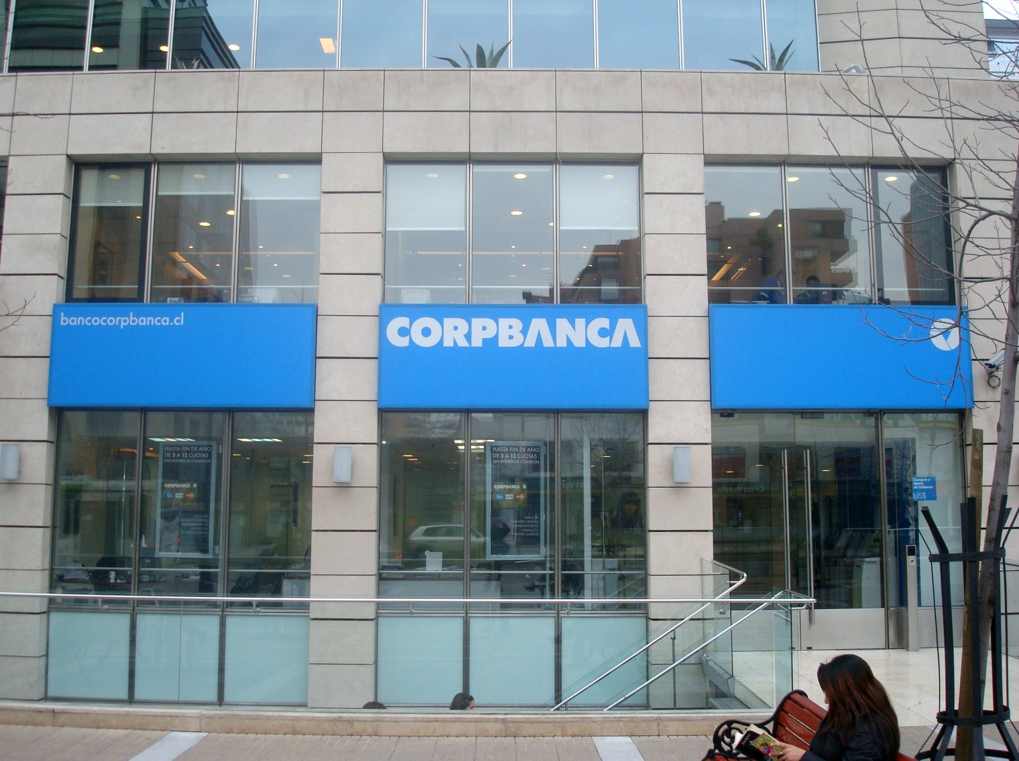 CorpBanca El Golf, Las Condes, Santiago de Chile